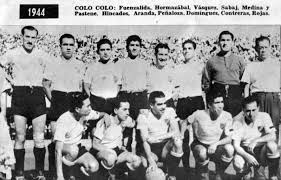 Formación equipo campeón 1944